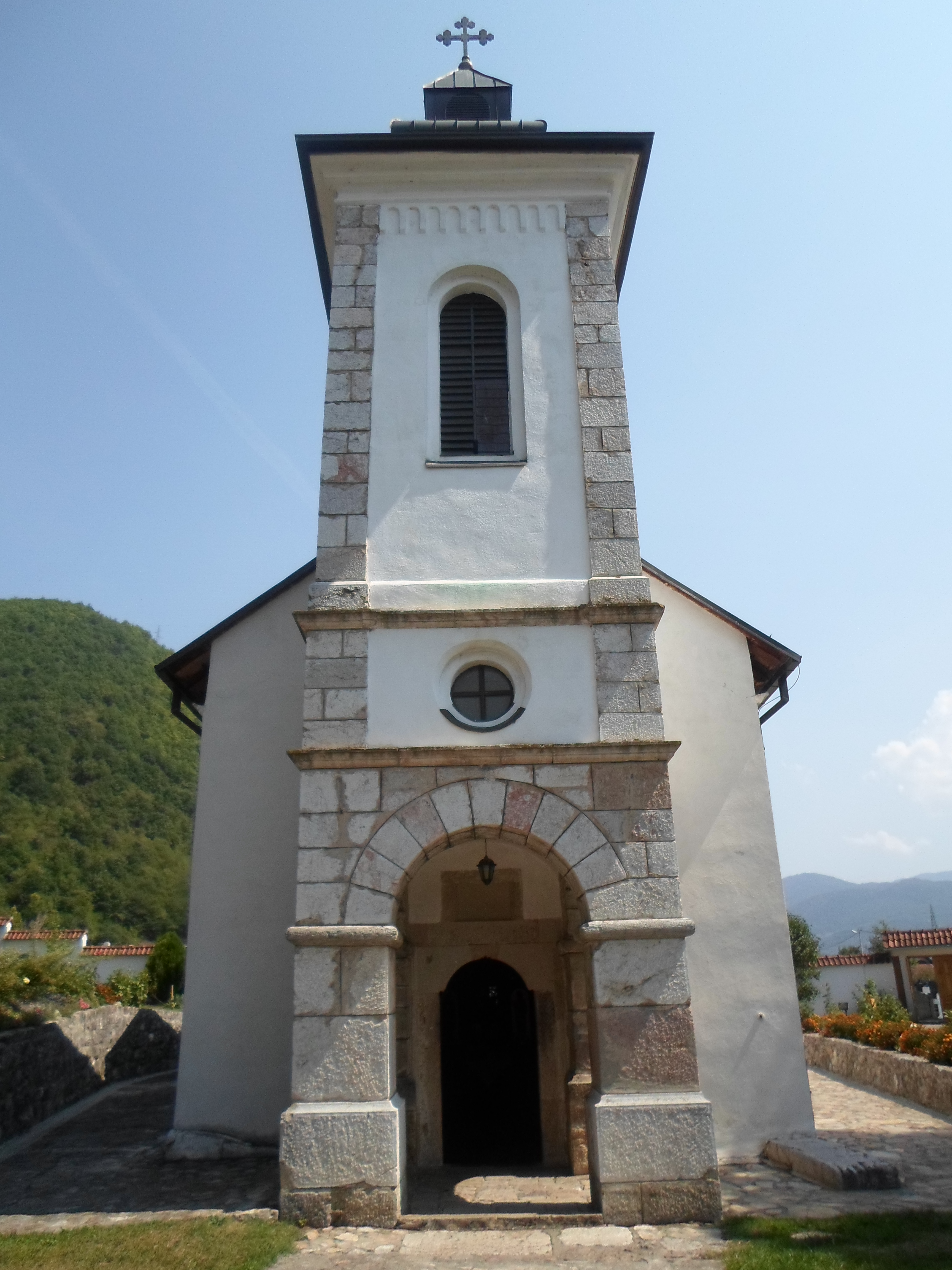 Crkva Svetog Đorđa, Novo Goražde This image was uploaded as part of Trace of Soul 2015.